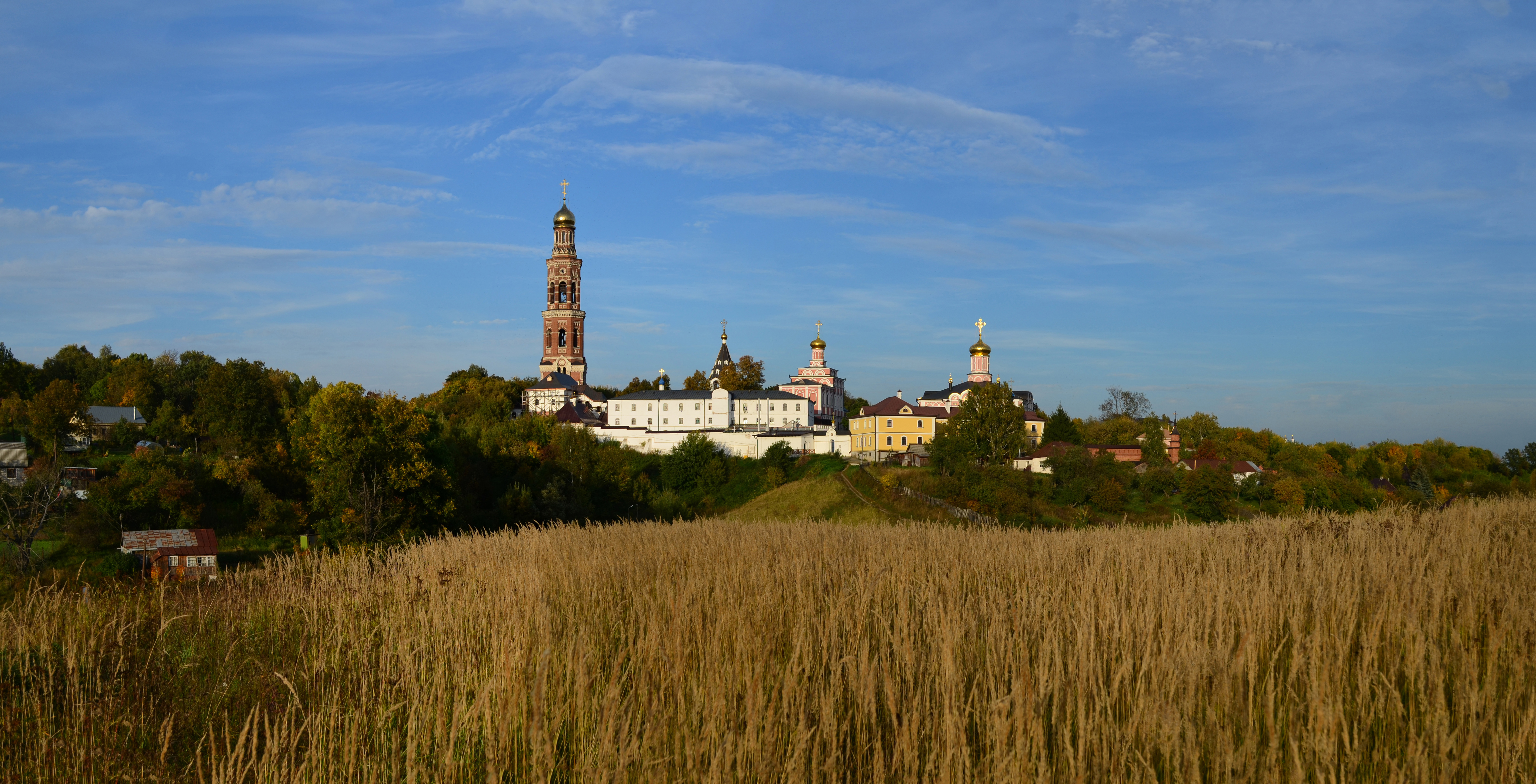 Рязанская область,Рыбновский район.Иоанно-Богословский мужской монастырь в Пощупово.